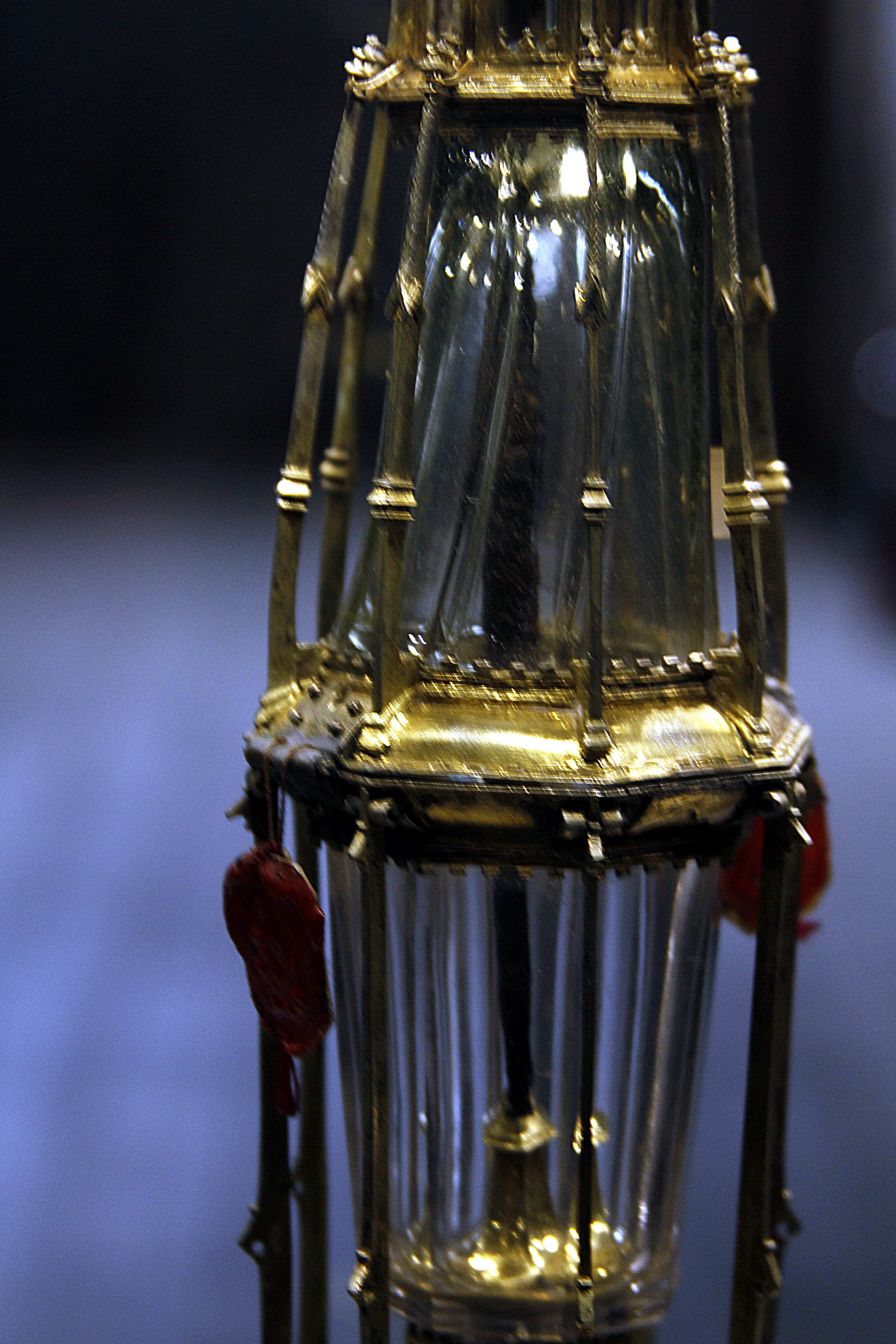 Santa Maria della Scalla - Siena